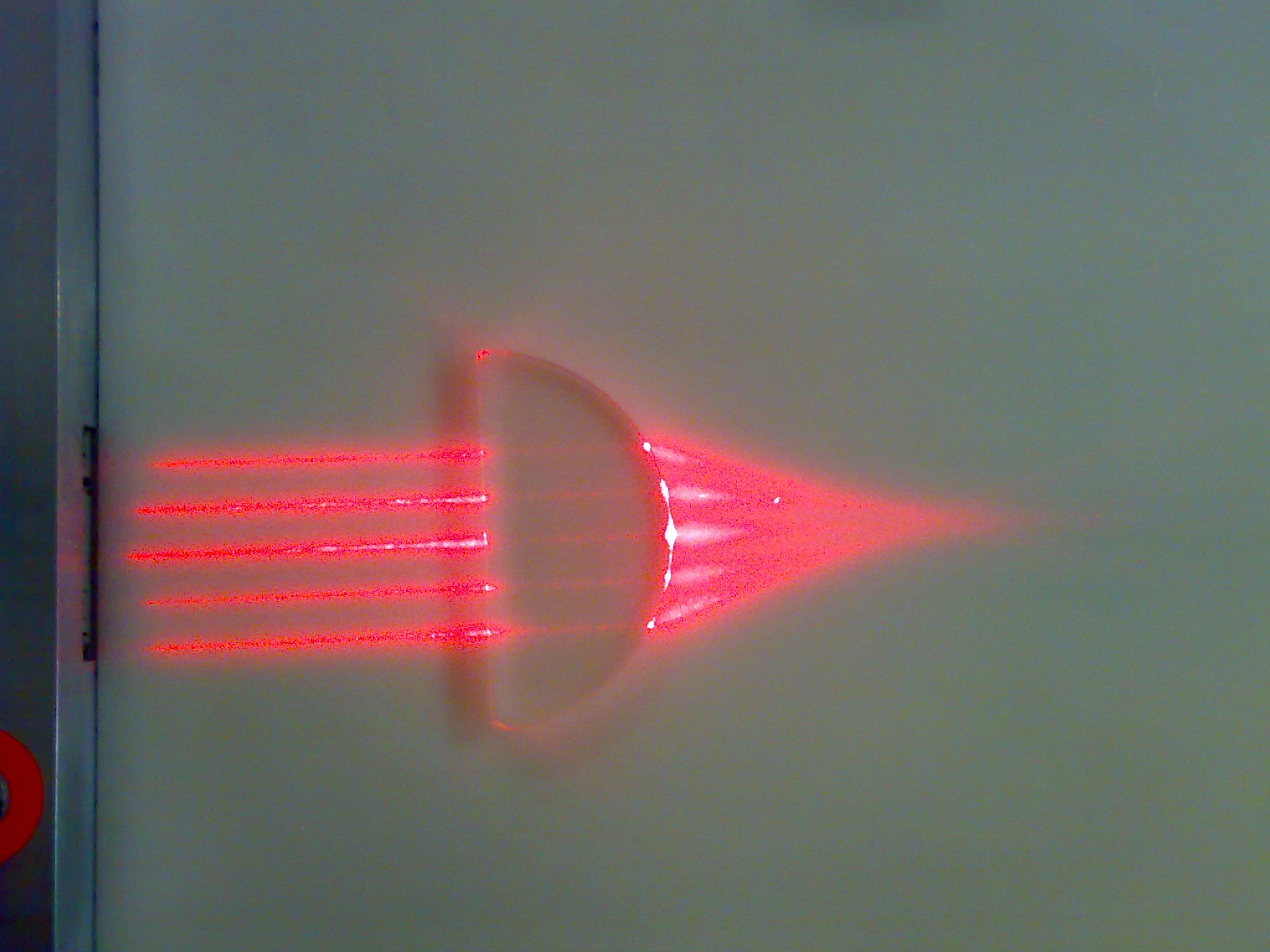 Prism